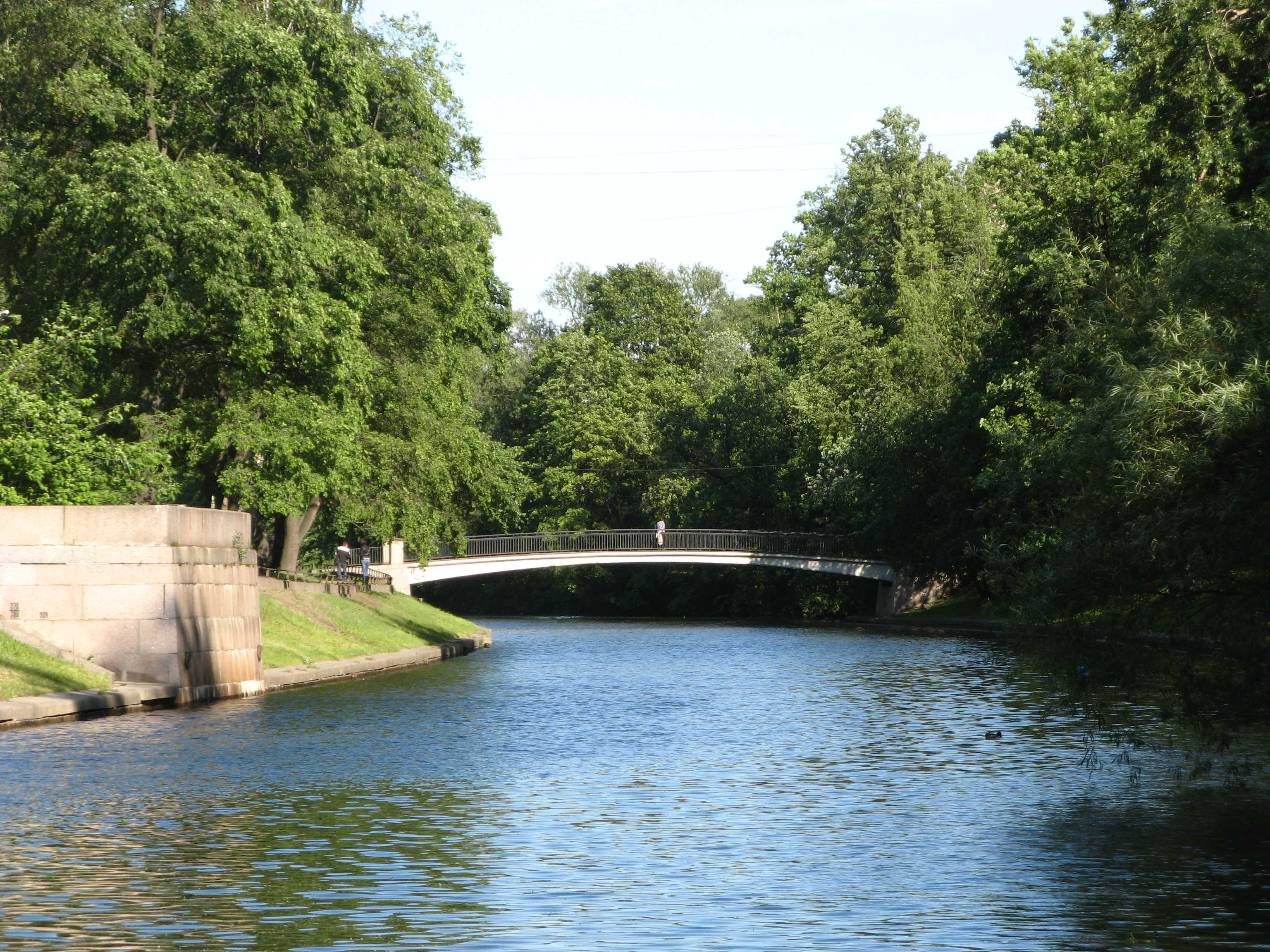 Строгановский мост через Чёрную речку (Санкт-Петербург)